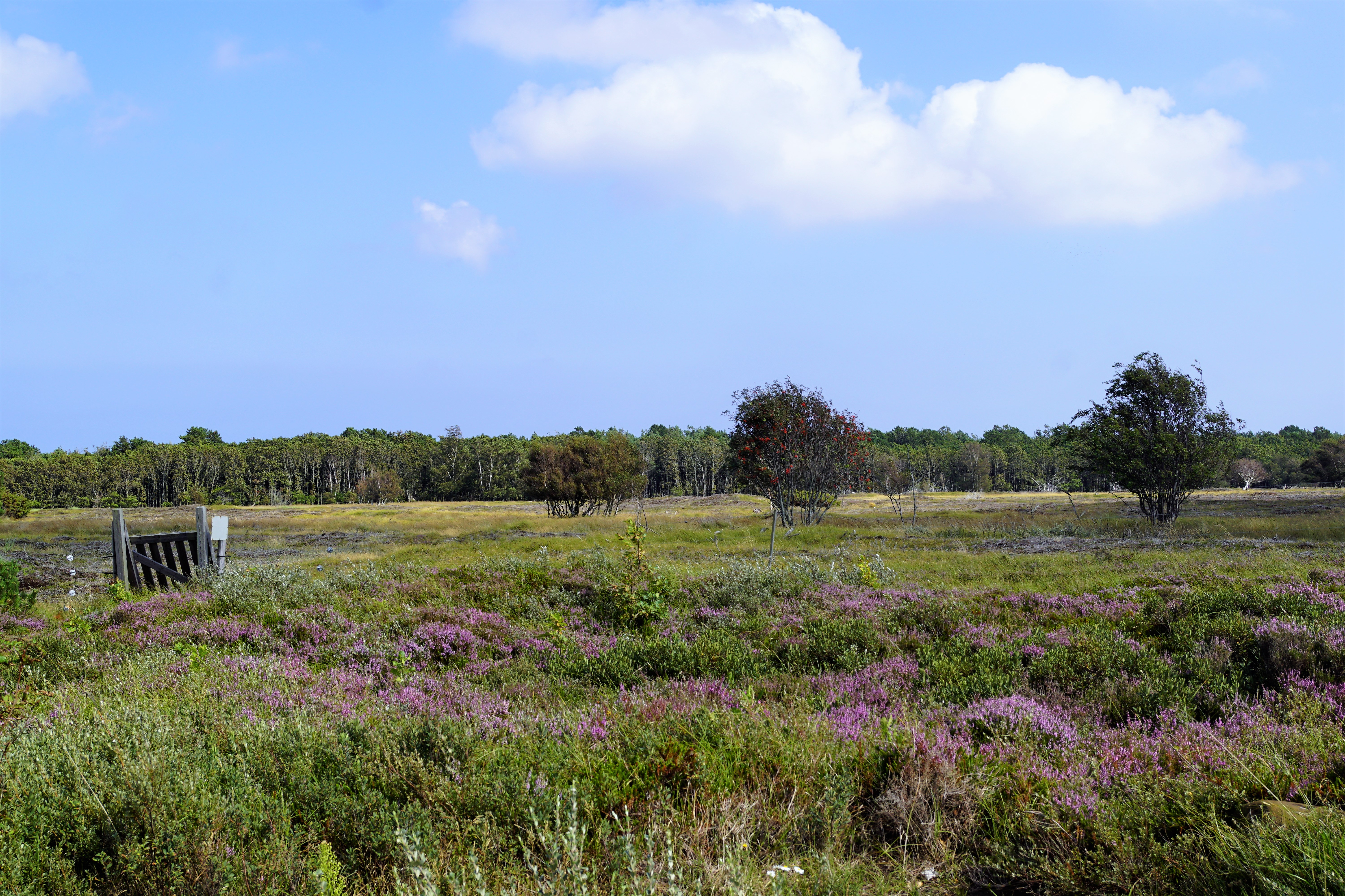 Hedesletten ved Horneks set mod øst